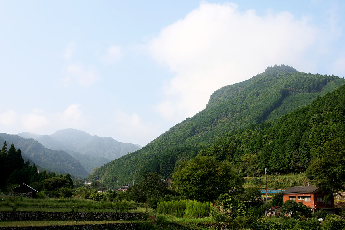 求菩提山（右）と犬ヶ岳（左奥）。日本、福岡県、豊前市求菩提から撮影。